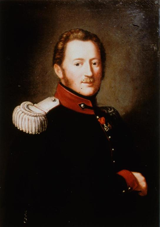 Théodore, comte de Waldner - 1786-1864